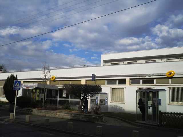 L'agence postale du centre-ville de Grigny (91)